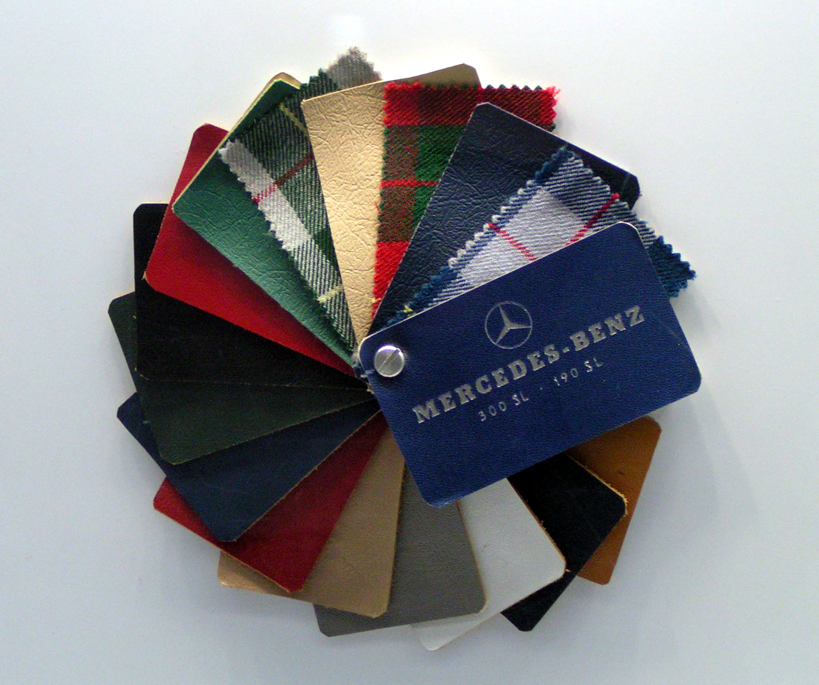 Innenausstattungsfarben